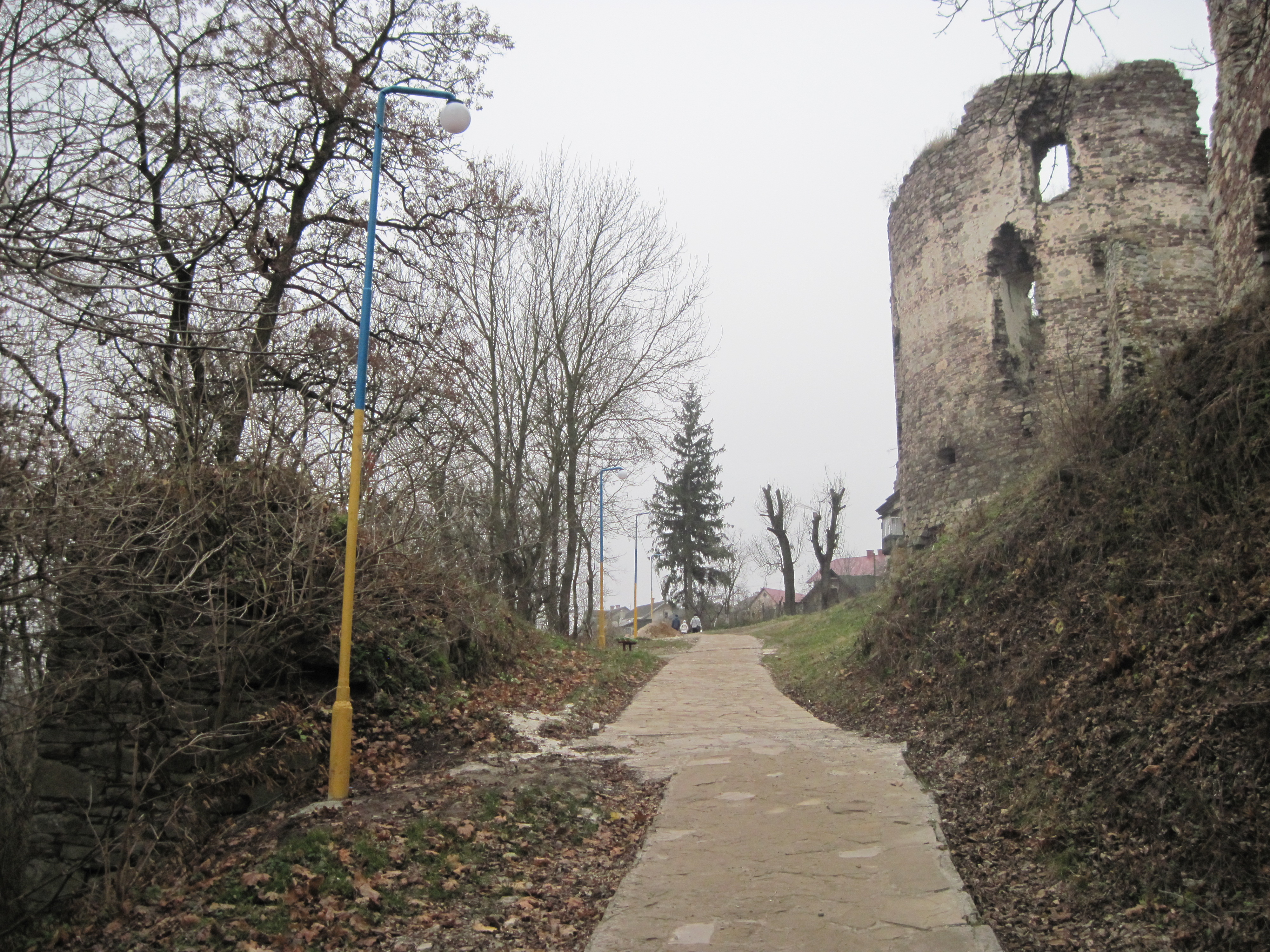 відновлена доріжка біля замку Бучача, листопад 2014